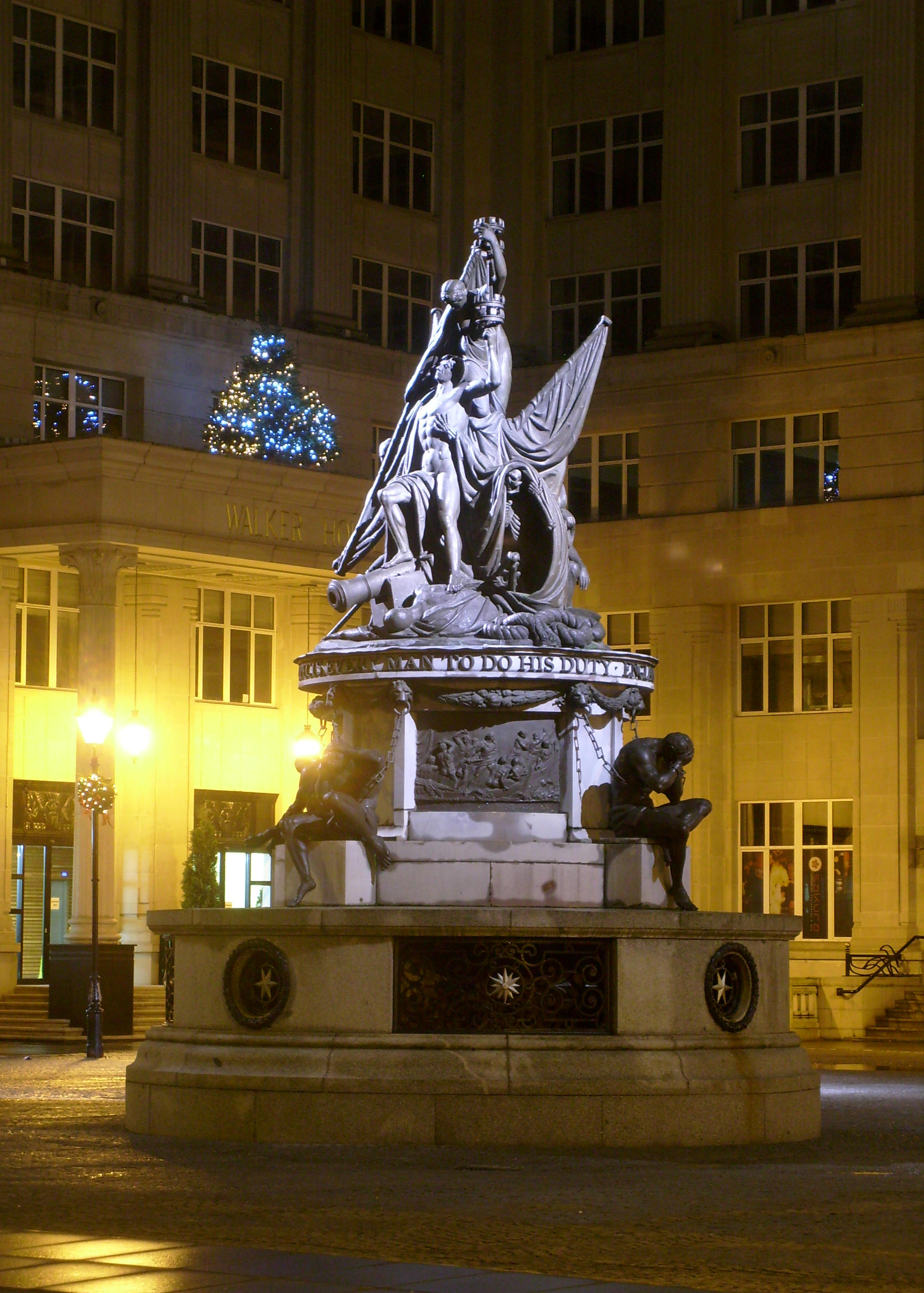 Nelson Monument, Liverpool